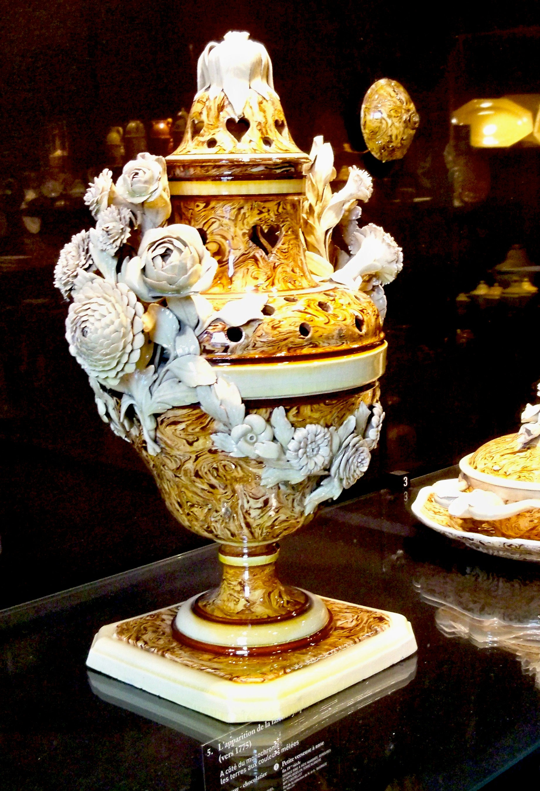 faience flammée d'Apt (84)